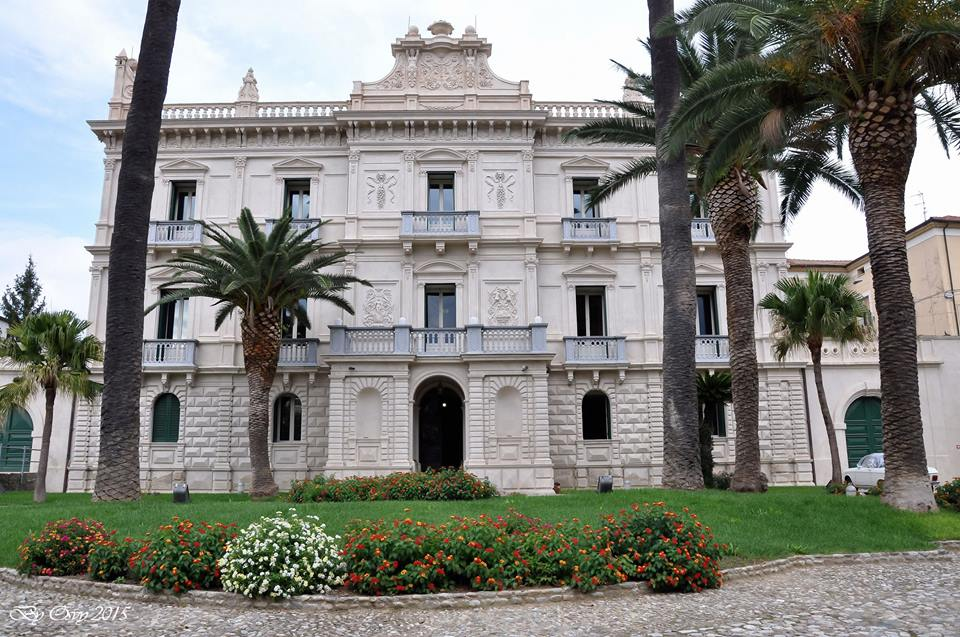 Prospetto frontale di Villa Rendano del 1800 nel centro storico di Cosenza